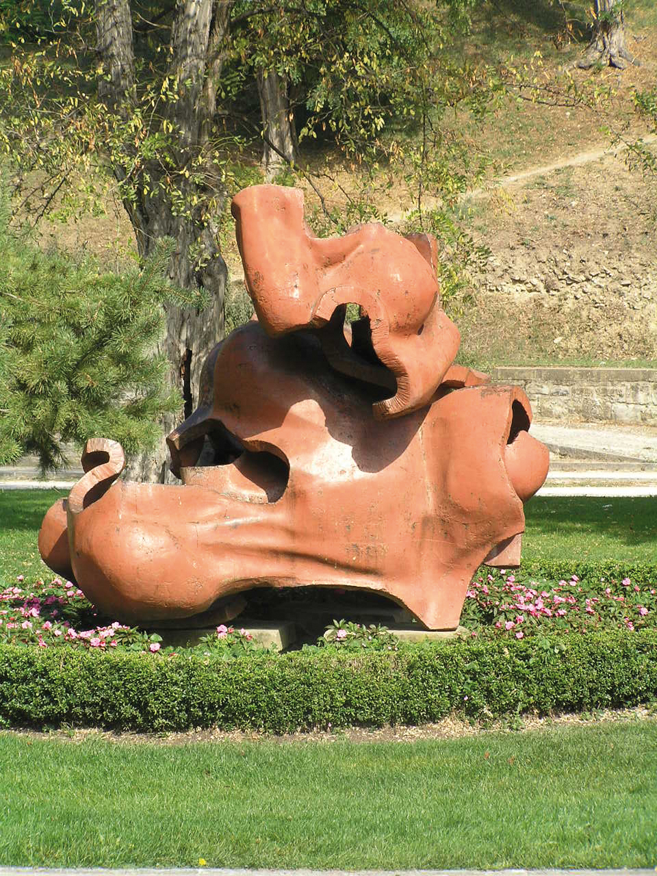 Escultura de Vicente Larrea en la Ciudadela de Pamplona. Escultura organizada mediante cóncavos y convexos